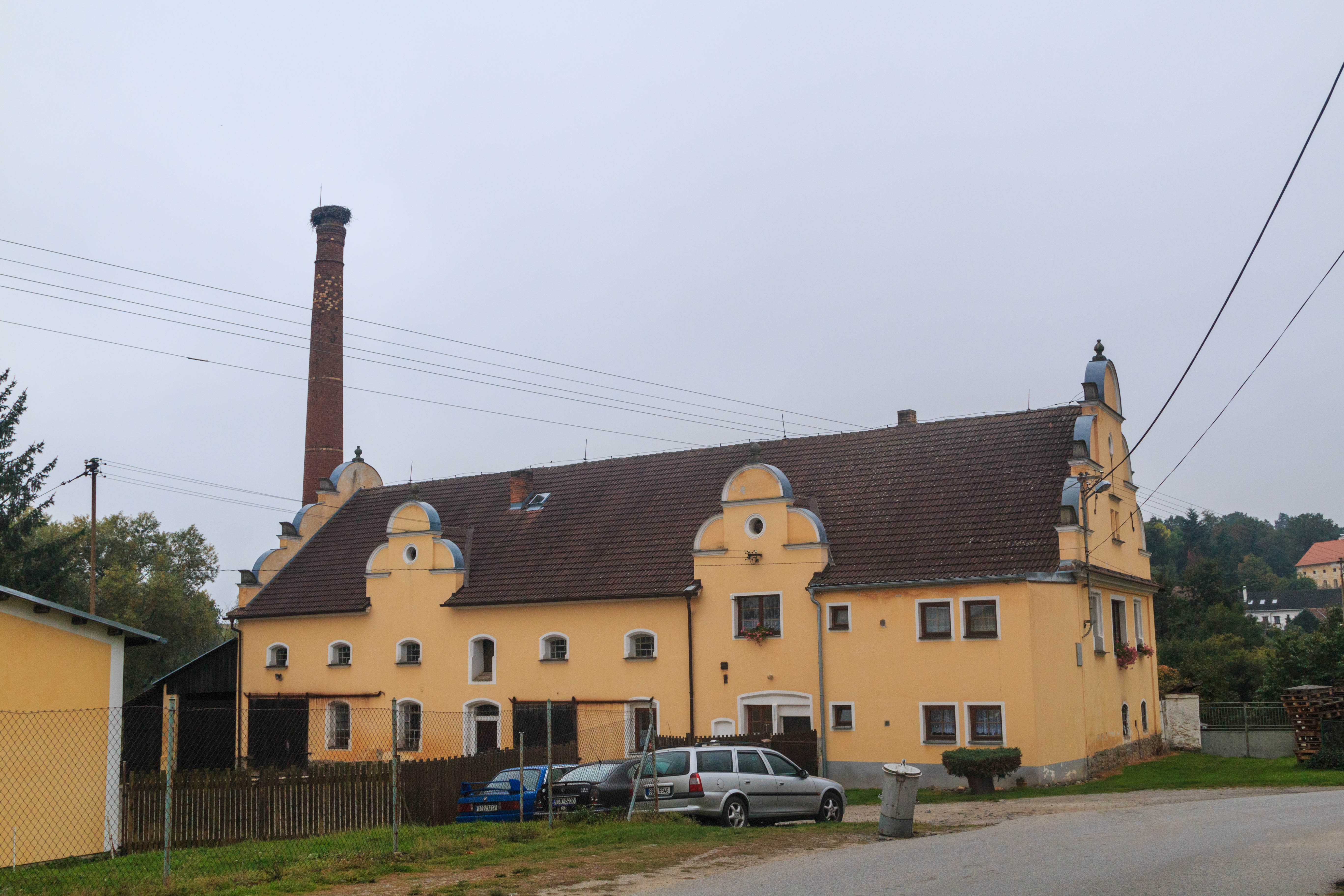 Čekanice - čp. 9